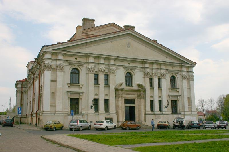 Zamosc (Poland)